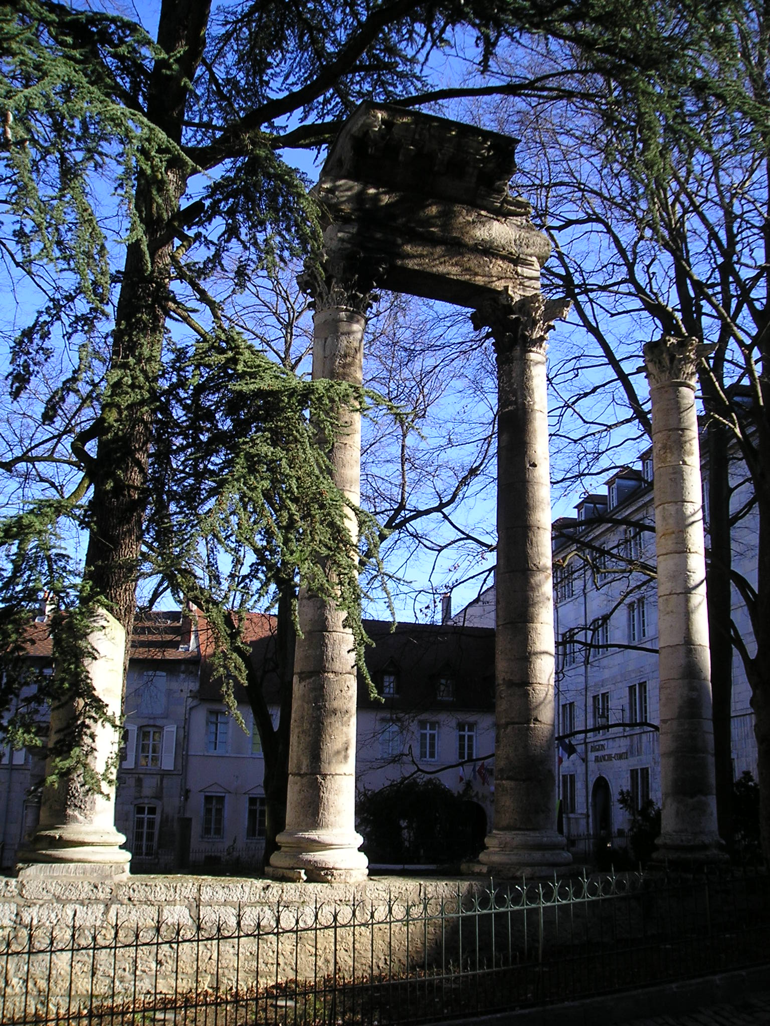 Square archéologique Castan de Besançon, France. Colonnes corinthiennes gallo-romaines découvertes lors de fouilles archéologiques menées par Auguste Castan en 1870 et relevées dans le cadre de la création d'un jardin à l'anglaise. / Castan archeological square of Besançon, France: Gallo-Roman remains of the 2nd or 3rd century.